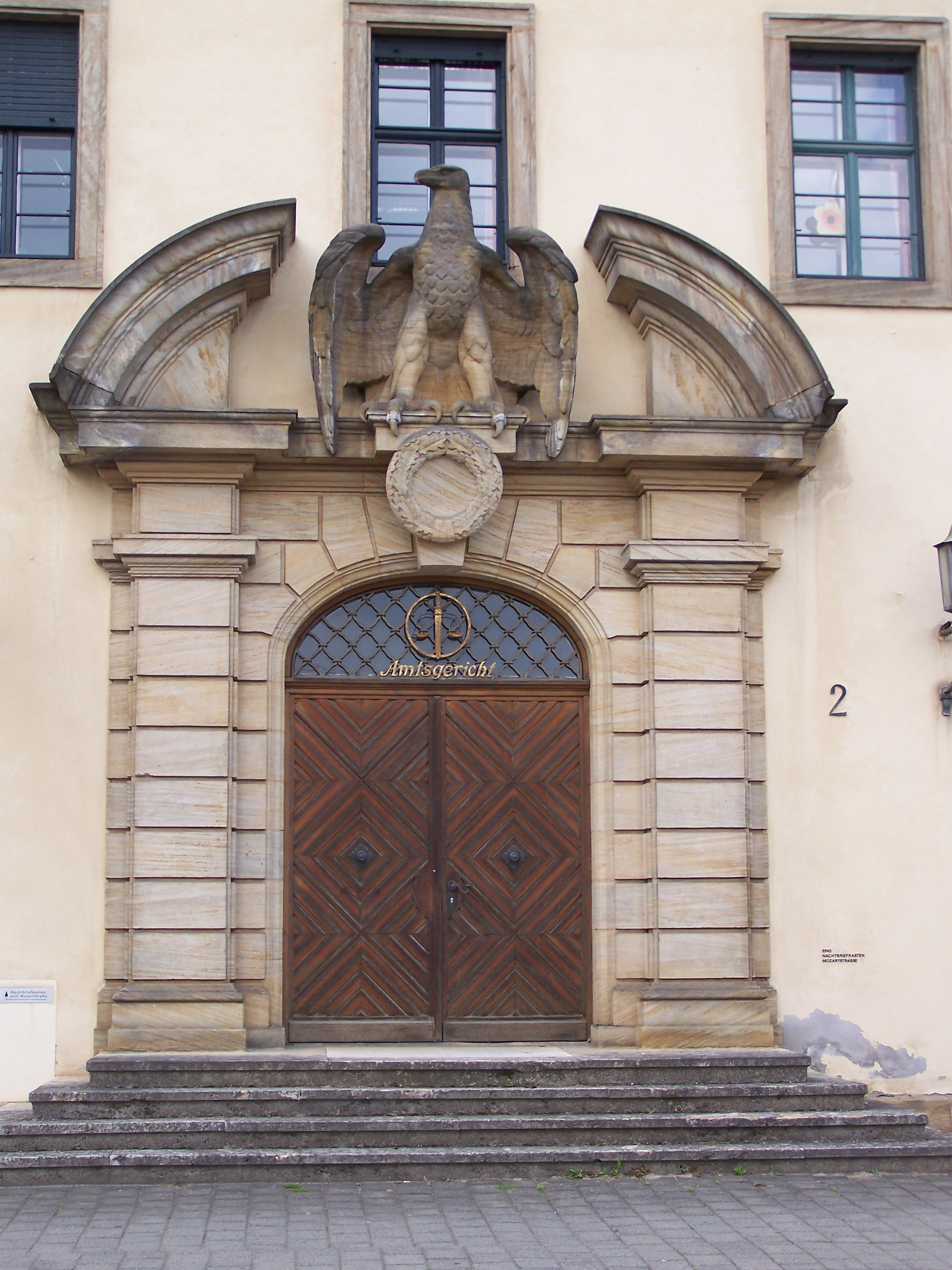 Das Bild stellt den Eingang zum Altbau des Amtsgerichts Erlangen dar.